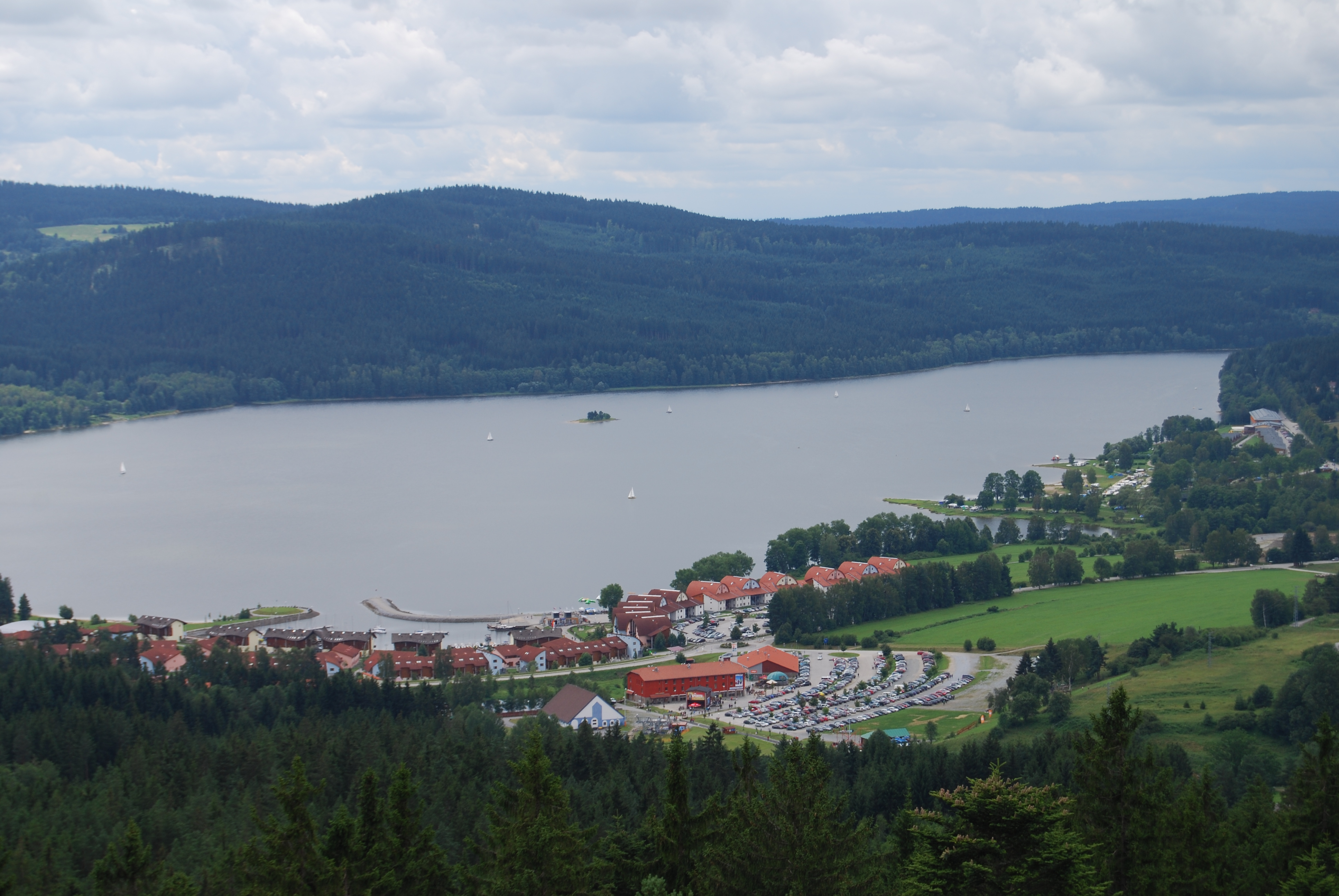 Pohled na okolí a část Lipenské nádrže z vyhlídky věže. Stezka korunami stromů. Lipno nad Vltavou. Okres Český Krumlov. Česká republika.